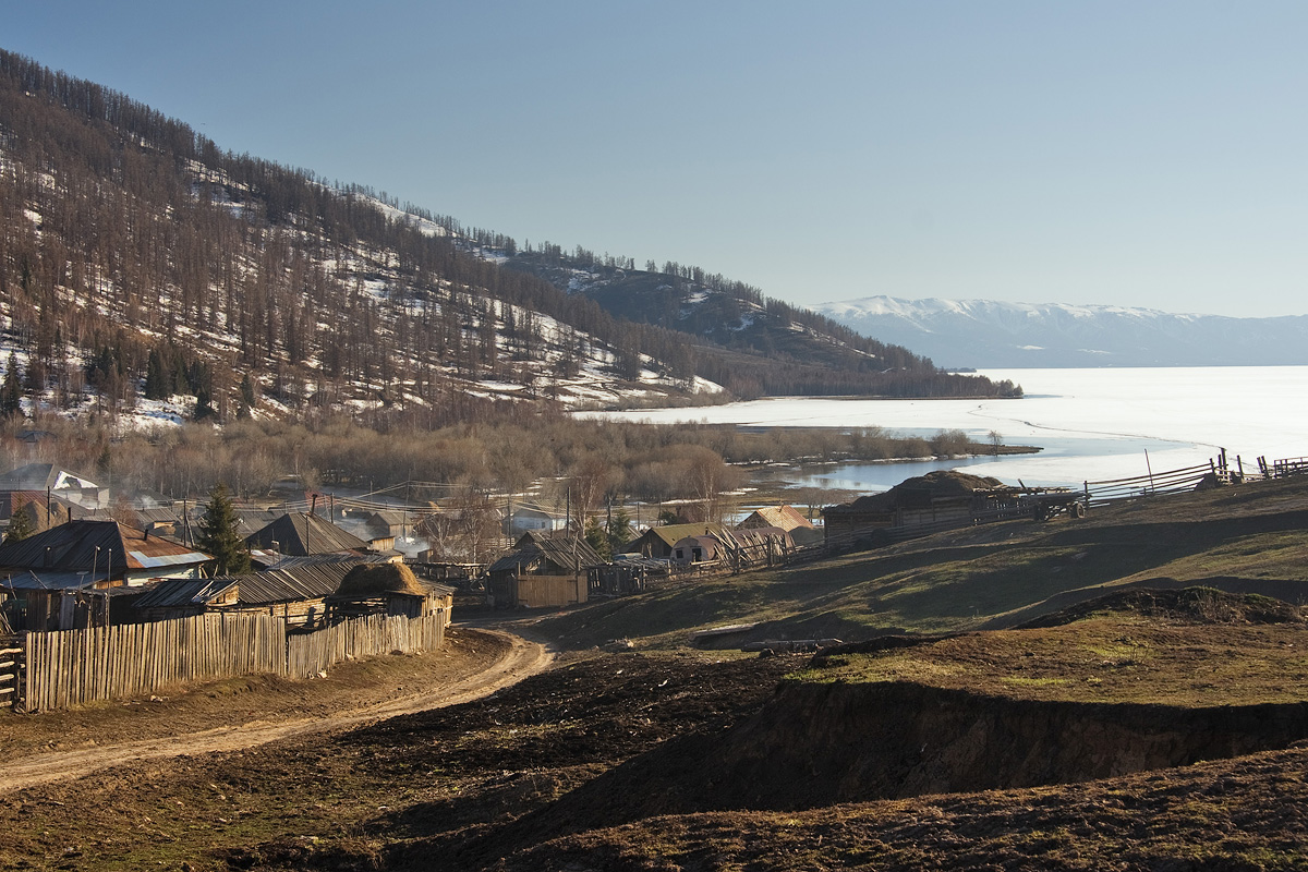 Urunkhayka village and Markakol lake